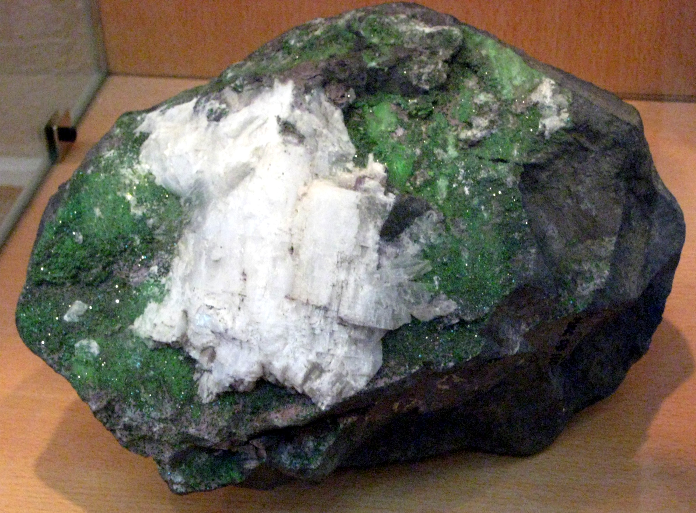 Chromite with calcite and uvarovit. Хромит с кальцитом и уваровитом. Сарановское месторождение, пермский край